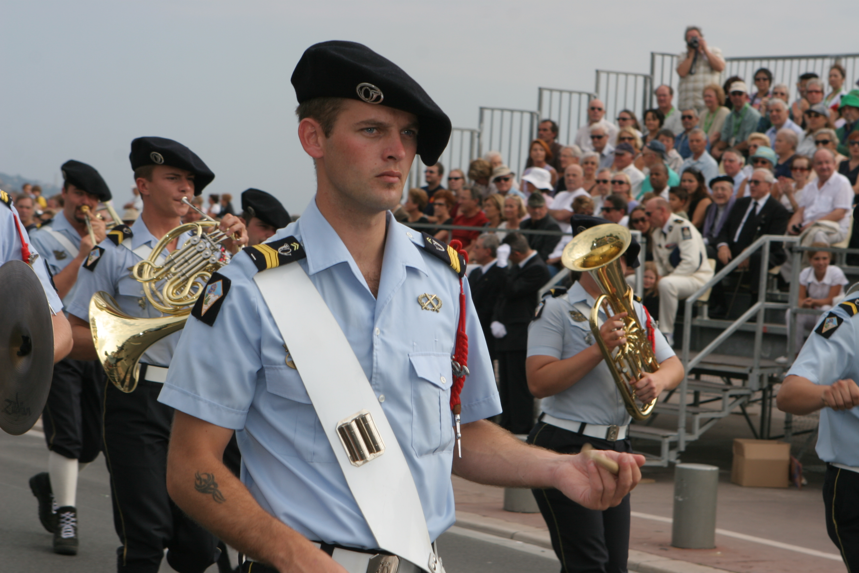 fanfare du 27e bataillon de chasseurs alpins d'Annecy (Haute-Savoie - France) lors du festival de musiques militaires de Nice le 6 octobre 2007. Les chasseurs sont en tenue de sortie bleue